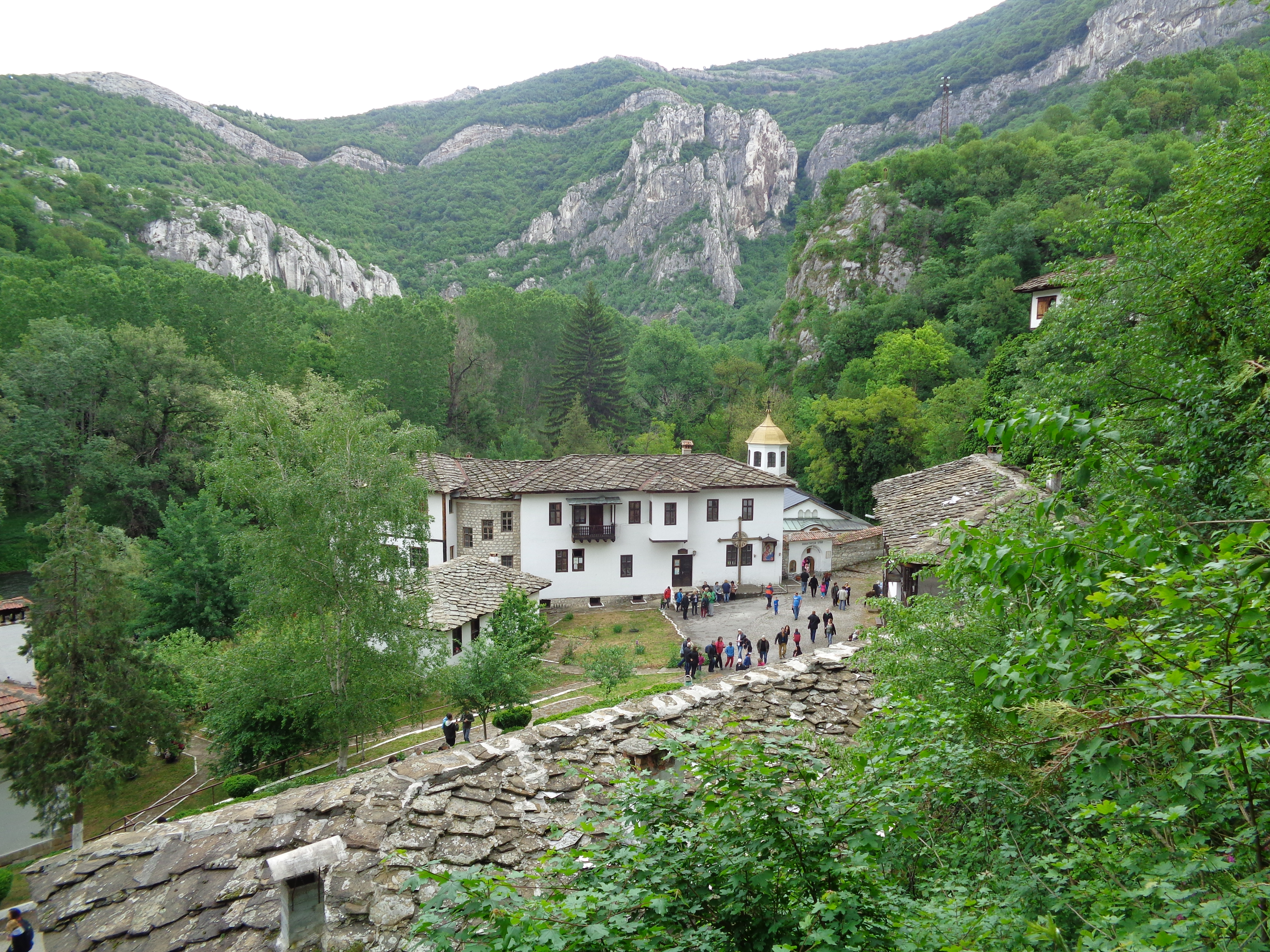 Врачански Балкан: Черепишкият манастир, в полите на величествените скали по Искърския пролом.